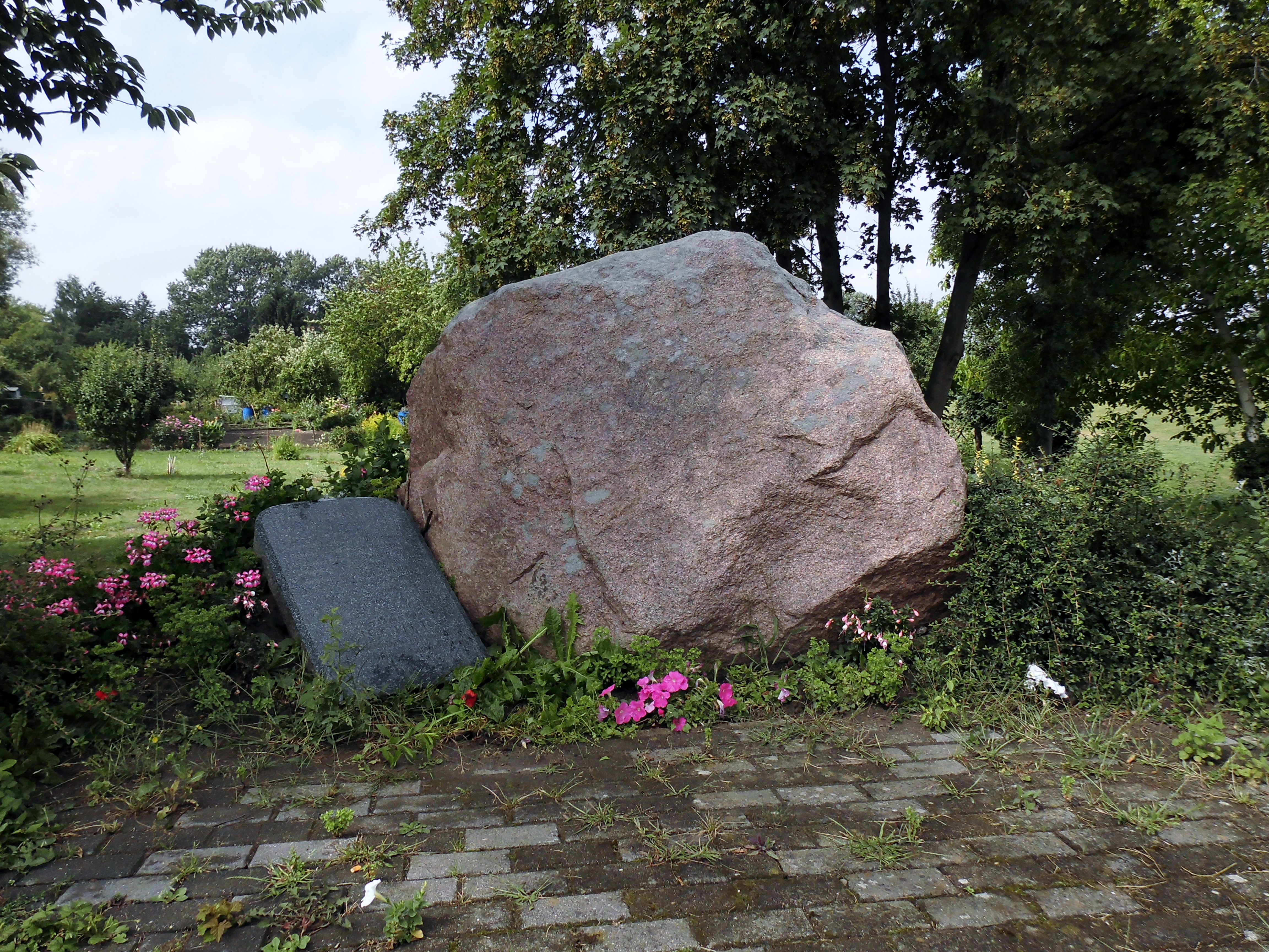 Gedenkstein für einen 1848 während der Revolutionsunruhen vom Militär erschossenen Landarbeiter, errichtet 1850